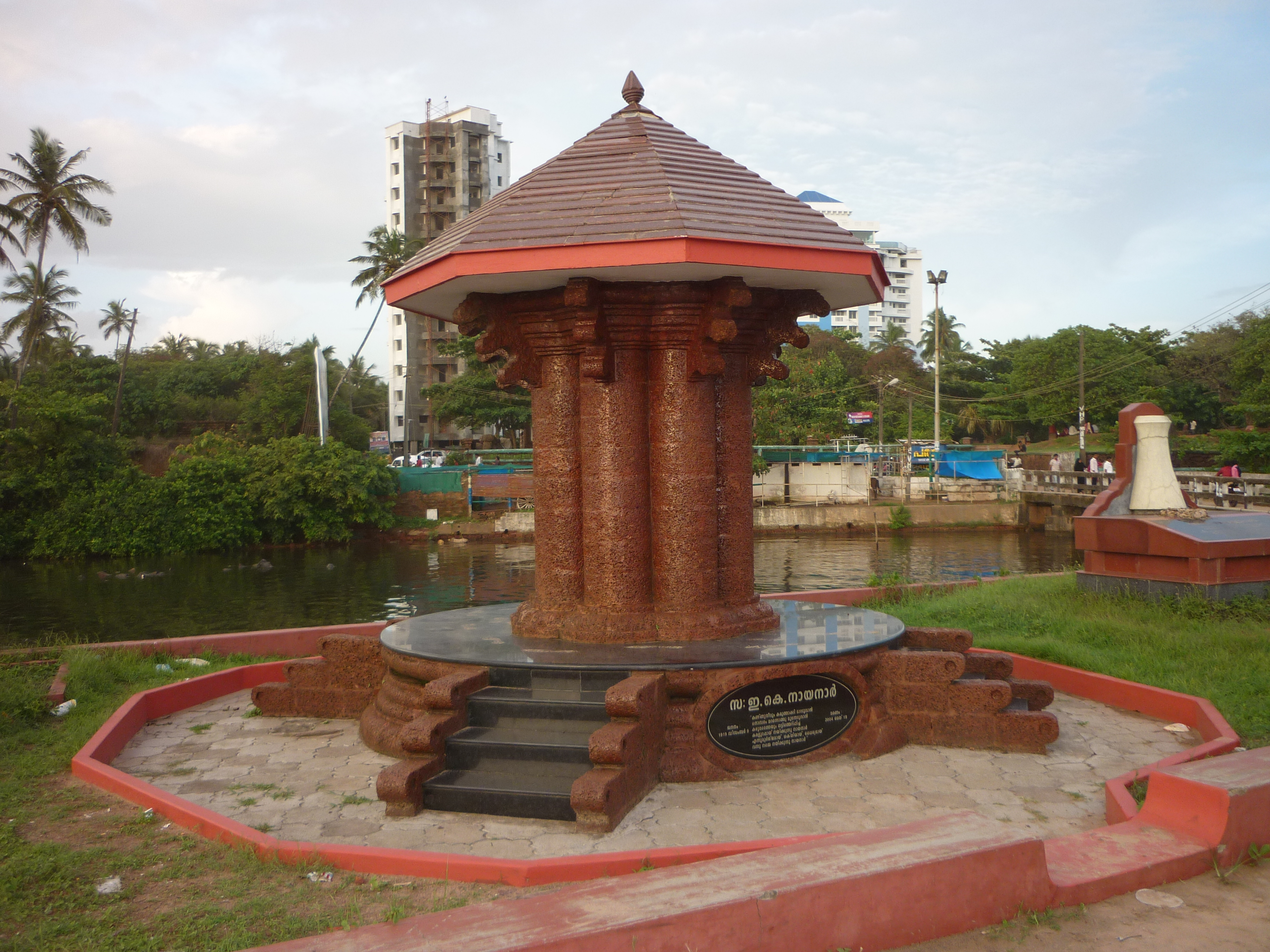 കണ്ണൂര്‍ പയ്യാമ്പലം കടല്‍തീരത്തു് സ: ഇ കെ നായനാര്‍ അന്ത്യവിശ്രമംകൊള്ളുന്നയിടം Unknown